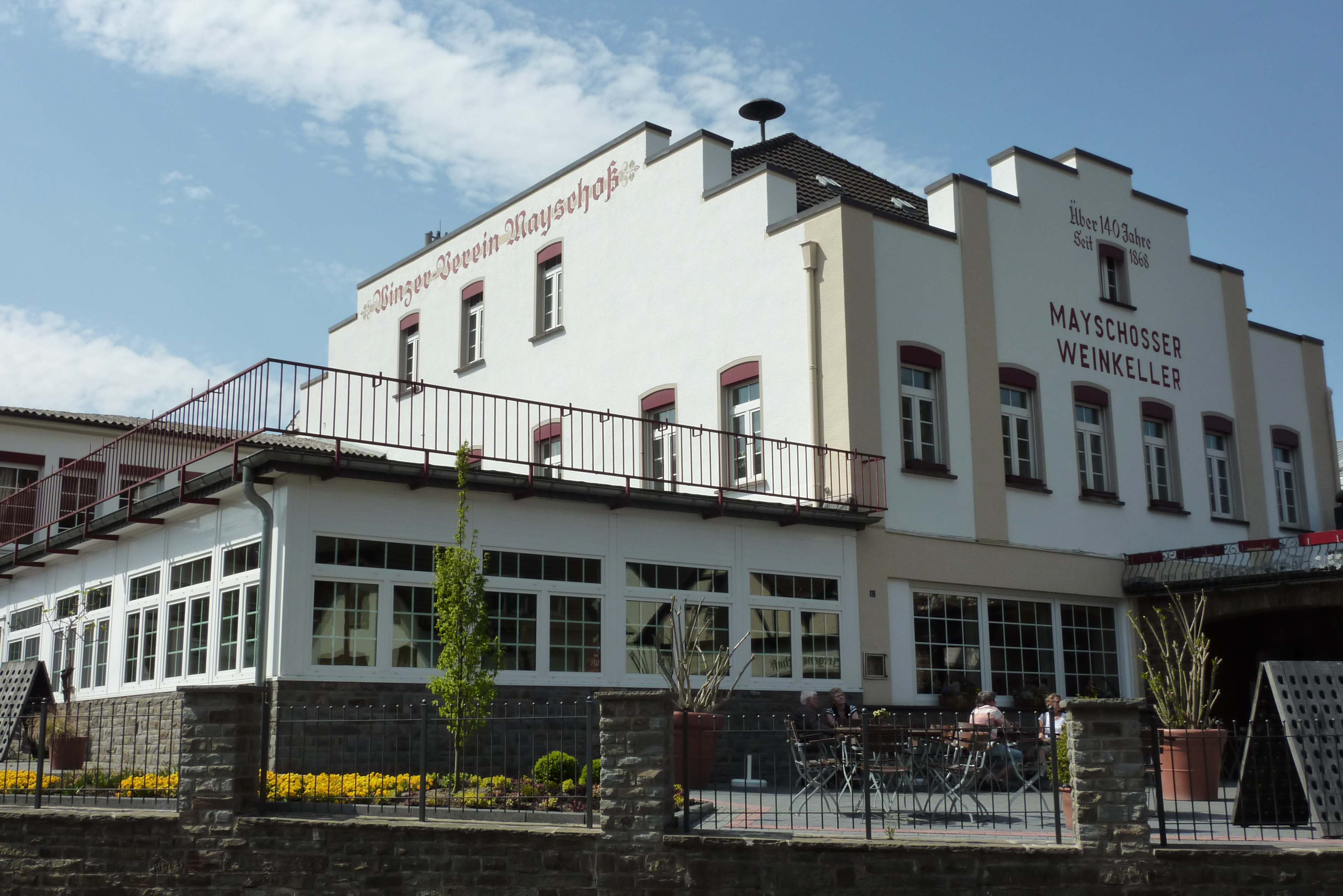 Winzer-Verein Mayschoß in Mayschoß